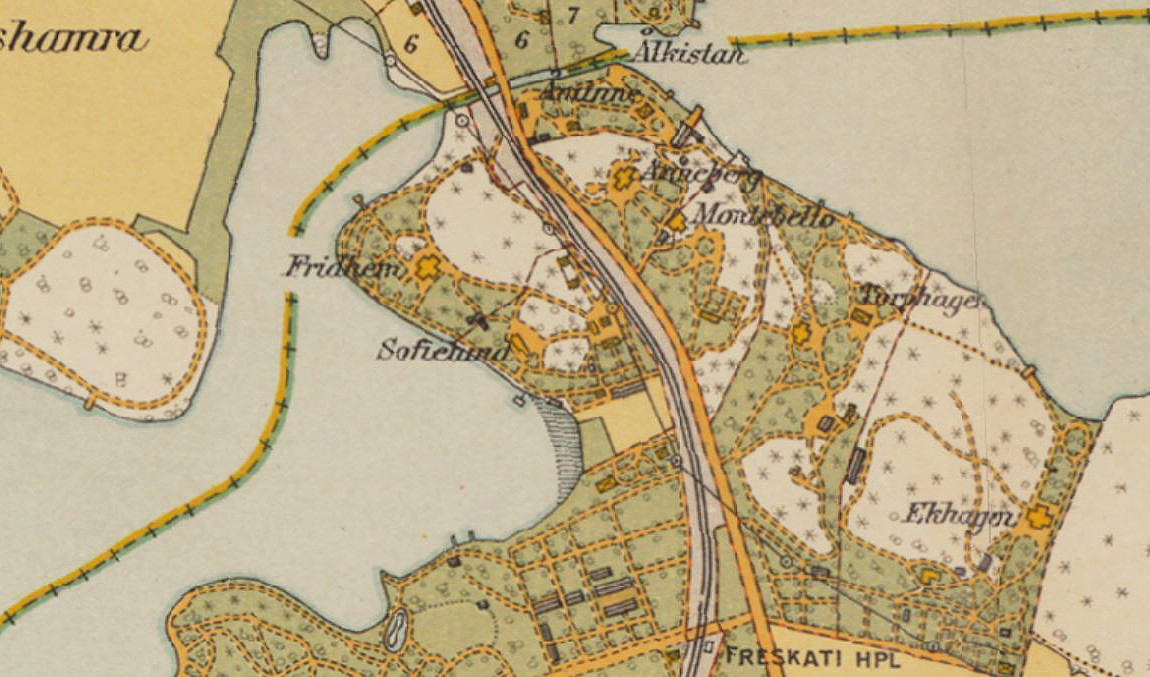 Del av 1934 års karta över Stockholm med omgivningar visande orådet söder om Ålkistan